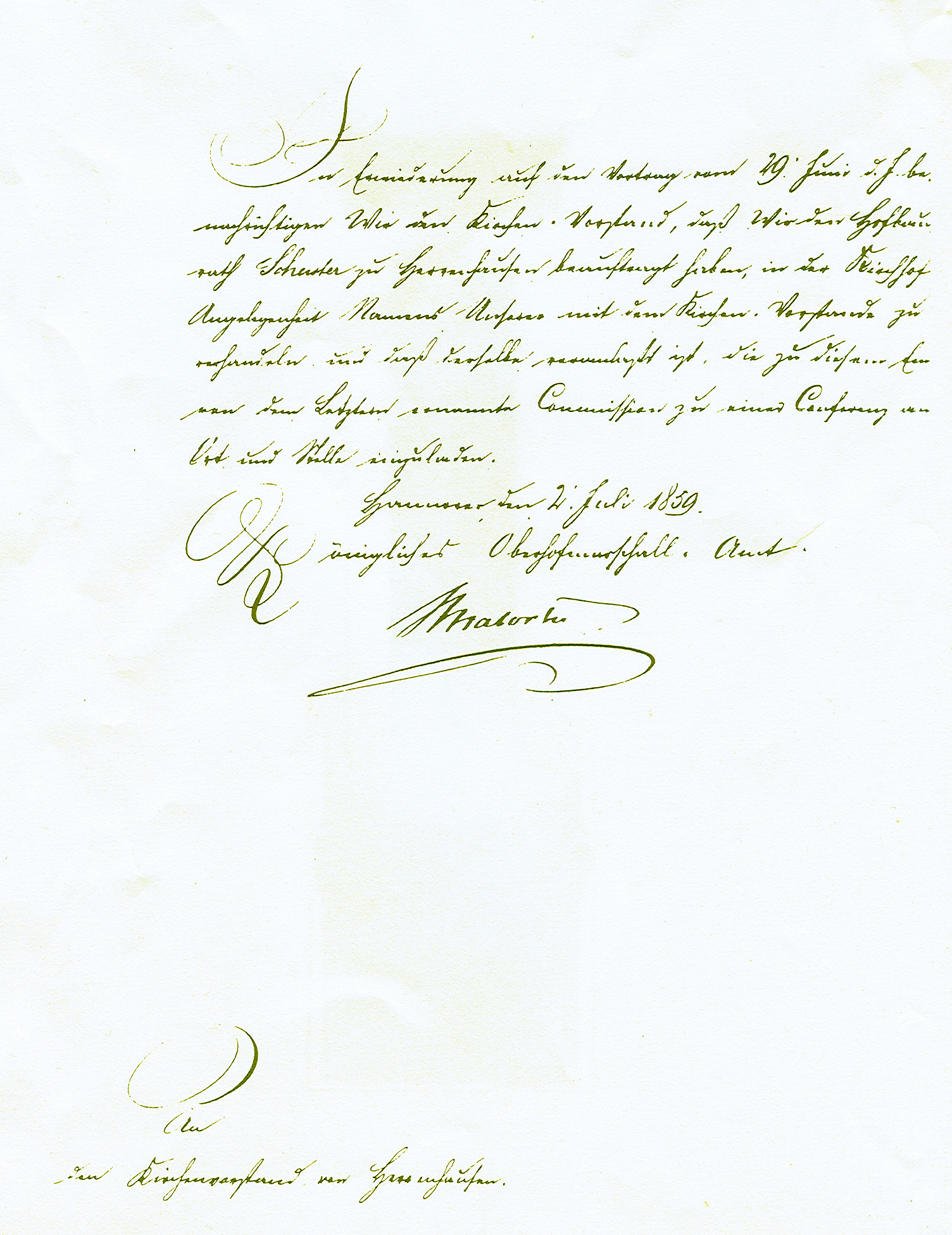 Kopie eines Briefes von Carl Ernst von Malortie, Königliches Hofmarschall-Amt, vom 2. Juli 1859 "an den Kirchenvorstand von Herrenhausen" . Transcription durch Frau Gitta Kirchhefer (Hannover-Herrenhausen): "In Erwiderung auf den Vortrag vom 29. Juni d. J. benachrichtigen Wir den Kirchen-Vorstand, daß Wir den Hofbaurath Schuster zu Herrenhausen beauftragt haben, in der Kirchhof-Angelegenheit, Namens Unserer mit dem Kirchen-Vorstande zu verhandeln, und daß derselbe veranlaßt ist, die zu diesem Ende von dem Letzteren ernannte Commission zu einer Conferenz an Ort und Stelle einzuladen. Hannover, den 2. Juli 1859. Königliches Oberhofmarschall-Amt. Malortie"